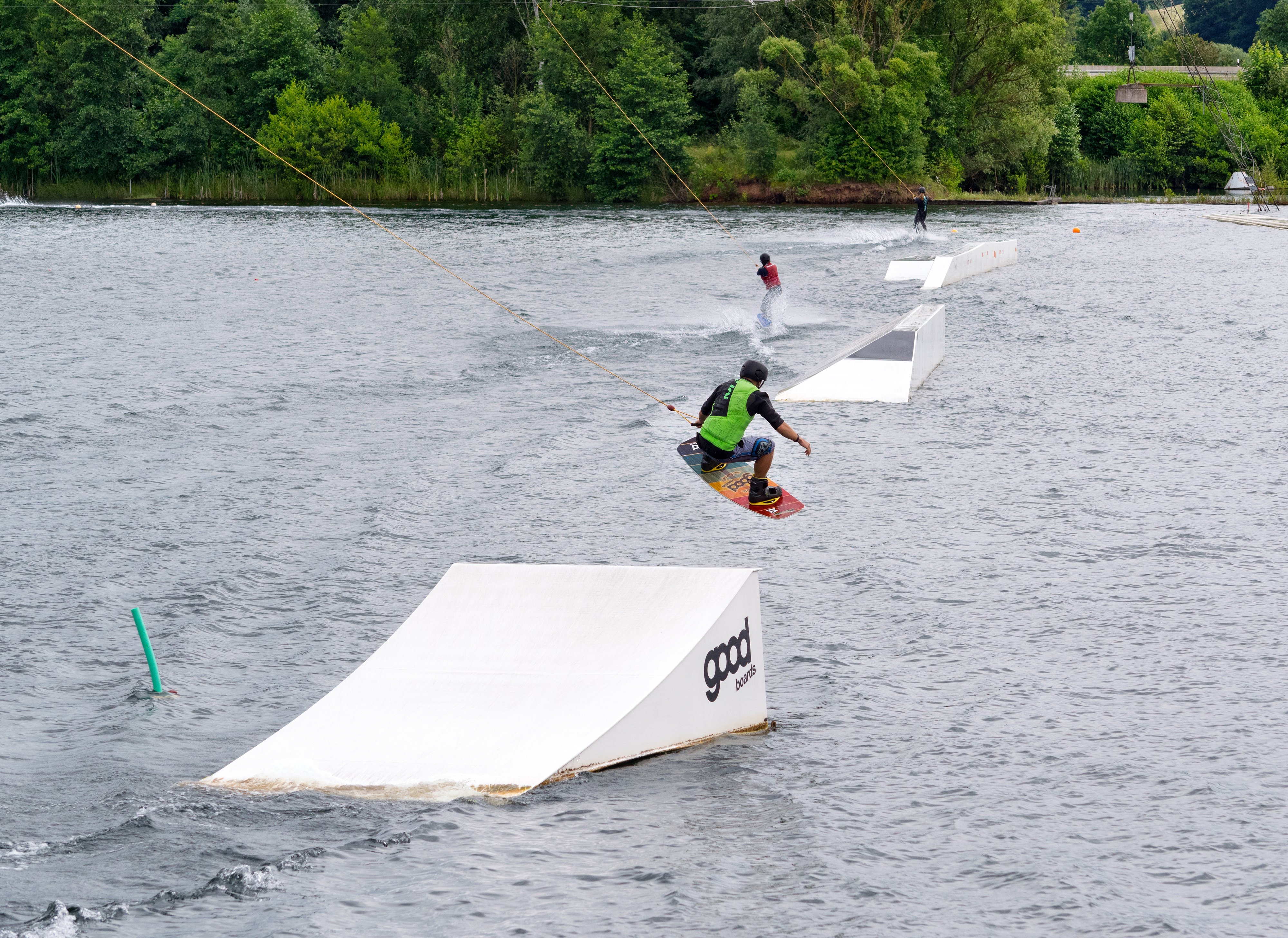 Wakeboarding im Seepark Niederweimar